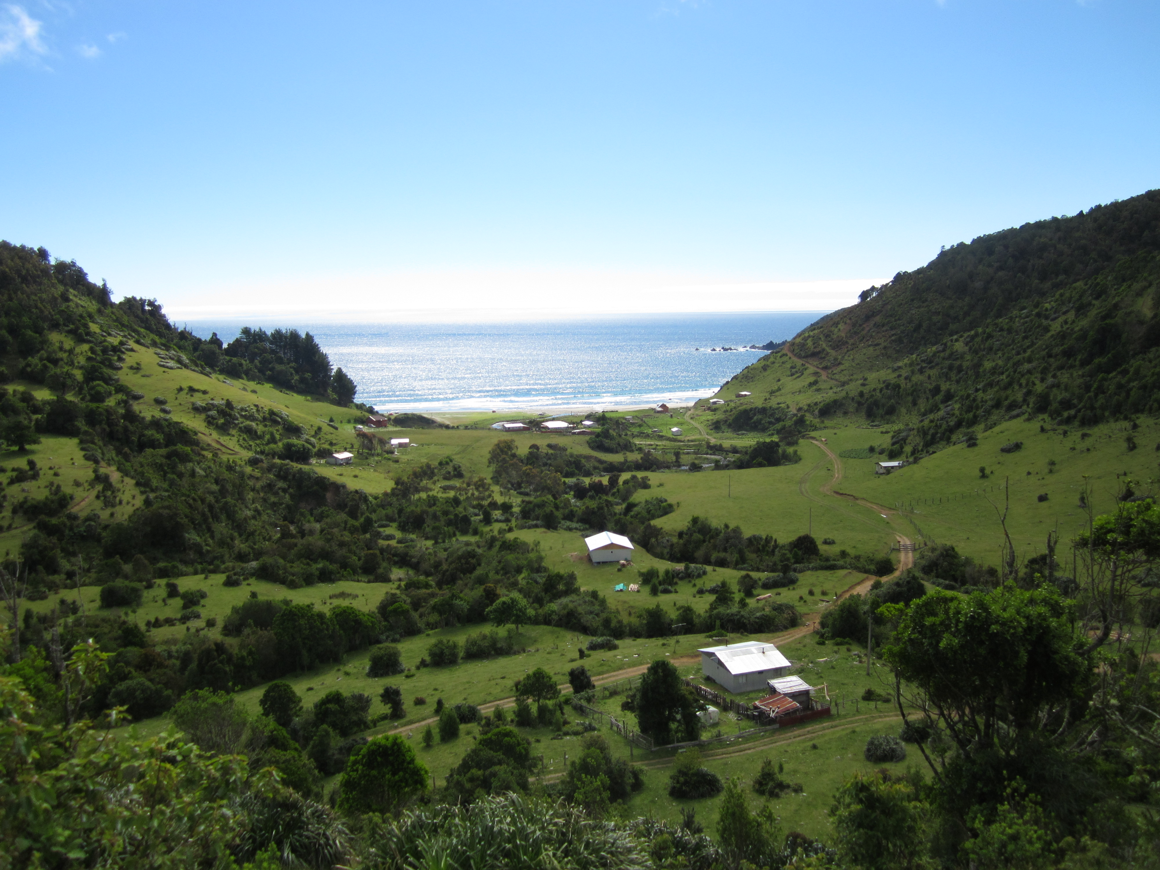 Pilolcura o Pilunkura, playa, valle, estero y caserío en la costa norte de la comuna de Valdivia.